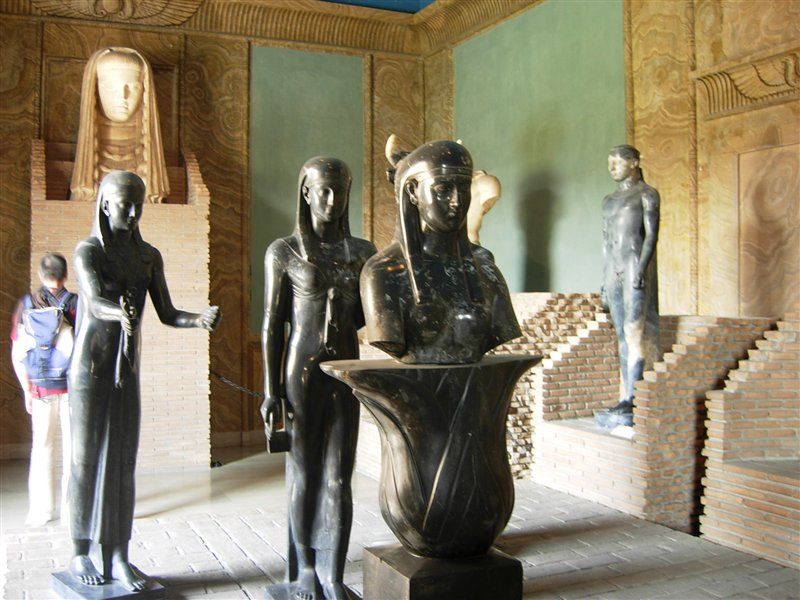 Vatican Museum Antiquities